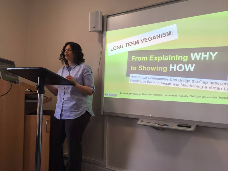 טל לבנה מרצה על אתגר 22+ של אנונימוס, בכנס "האתיקה של אכילת בעלי חיים" באוקספורד , אנגליה